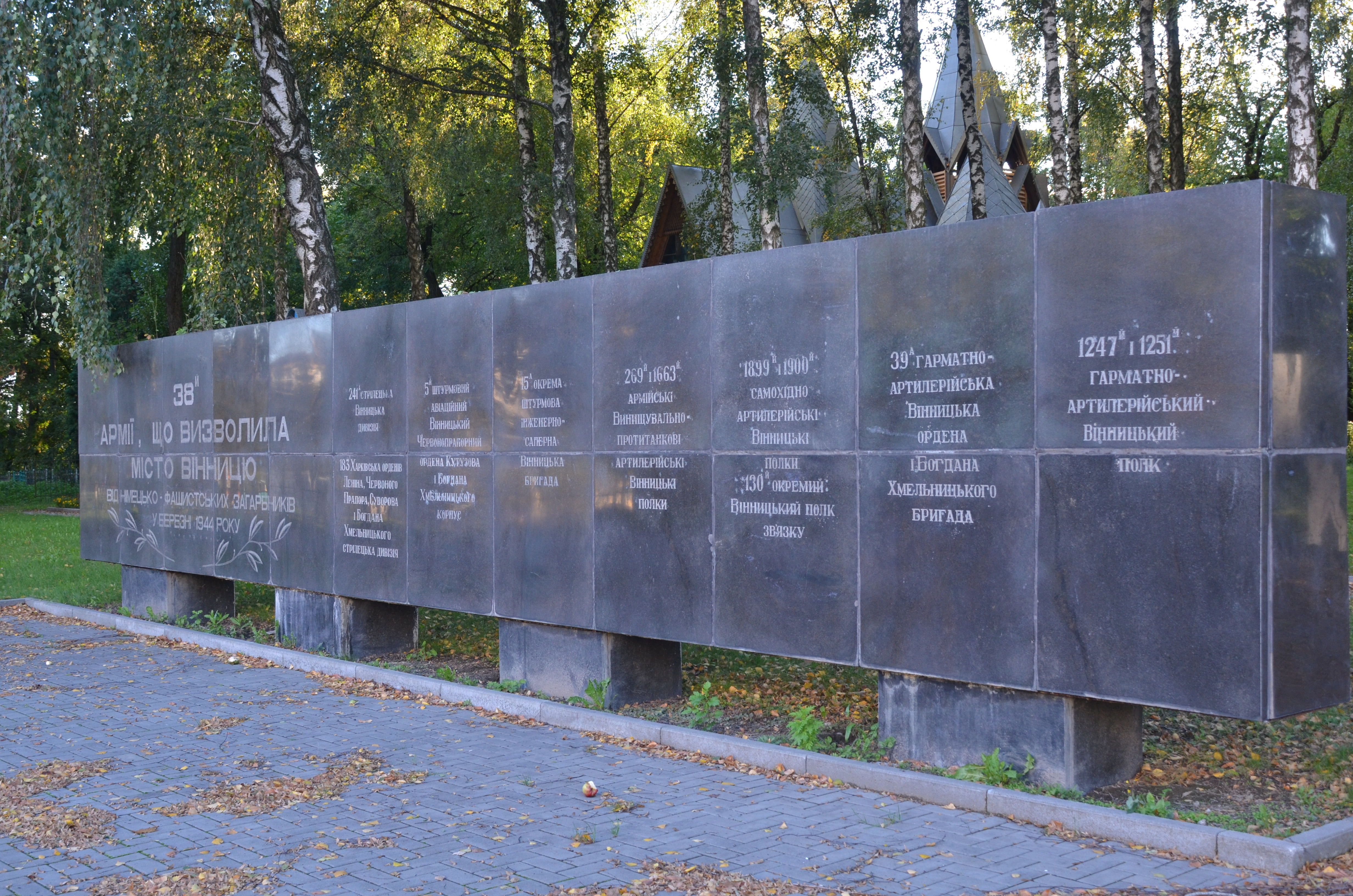 Меморіальне кладовище 4006 воїнів Радянської Армії, загиблих при звільненні міста, Вінниця, вул. Київська